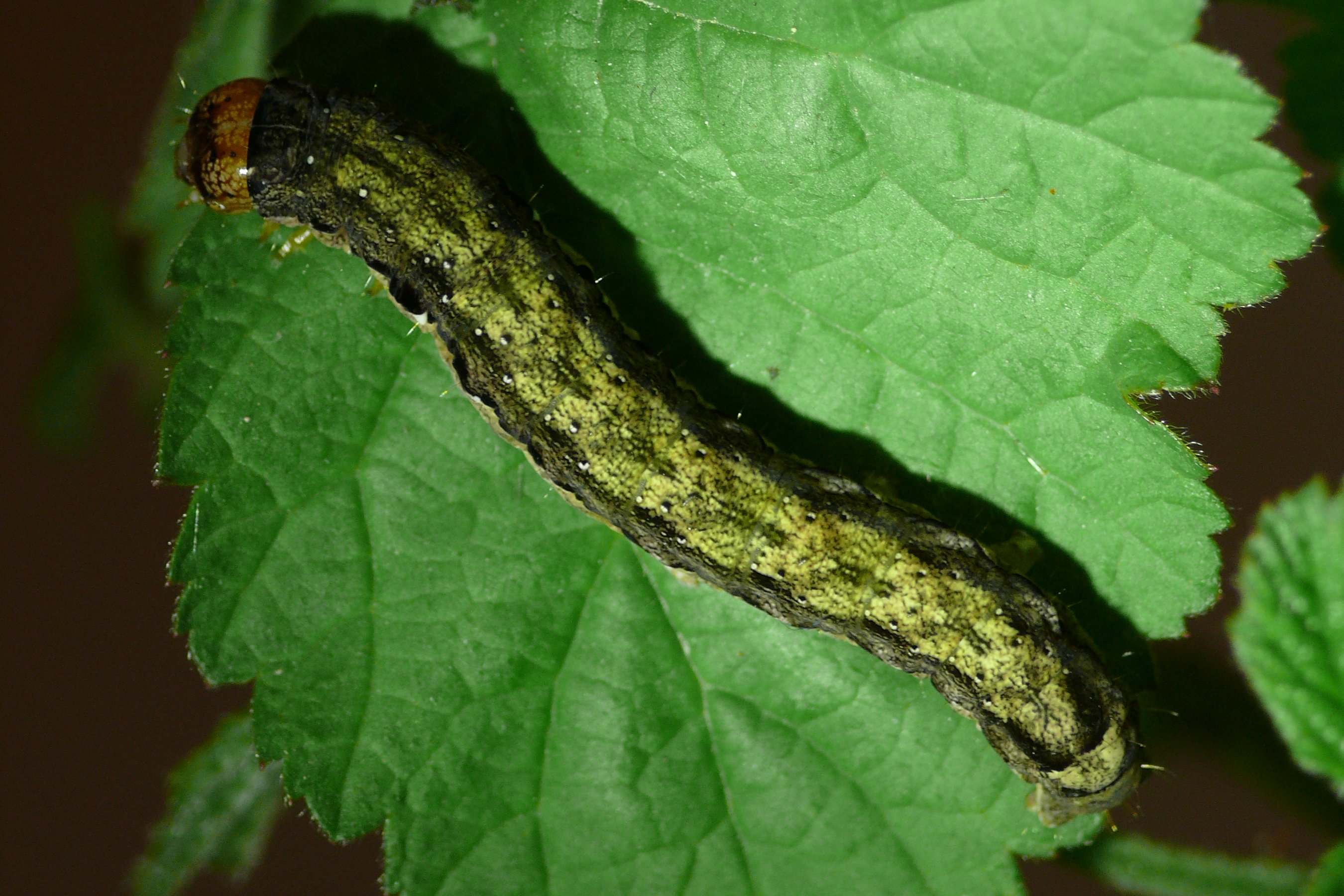 Rauep von Orthosia munda, Isarauen bei Hallbergmoos